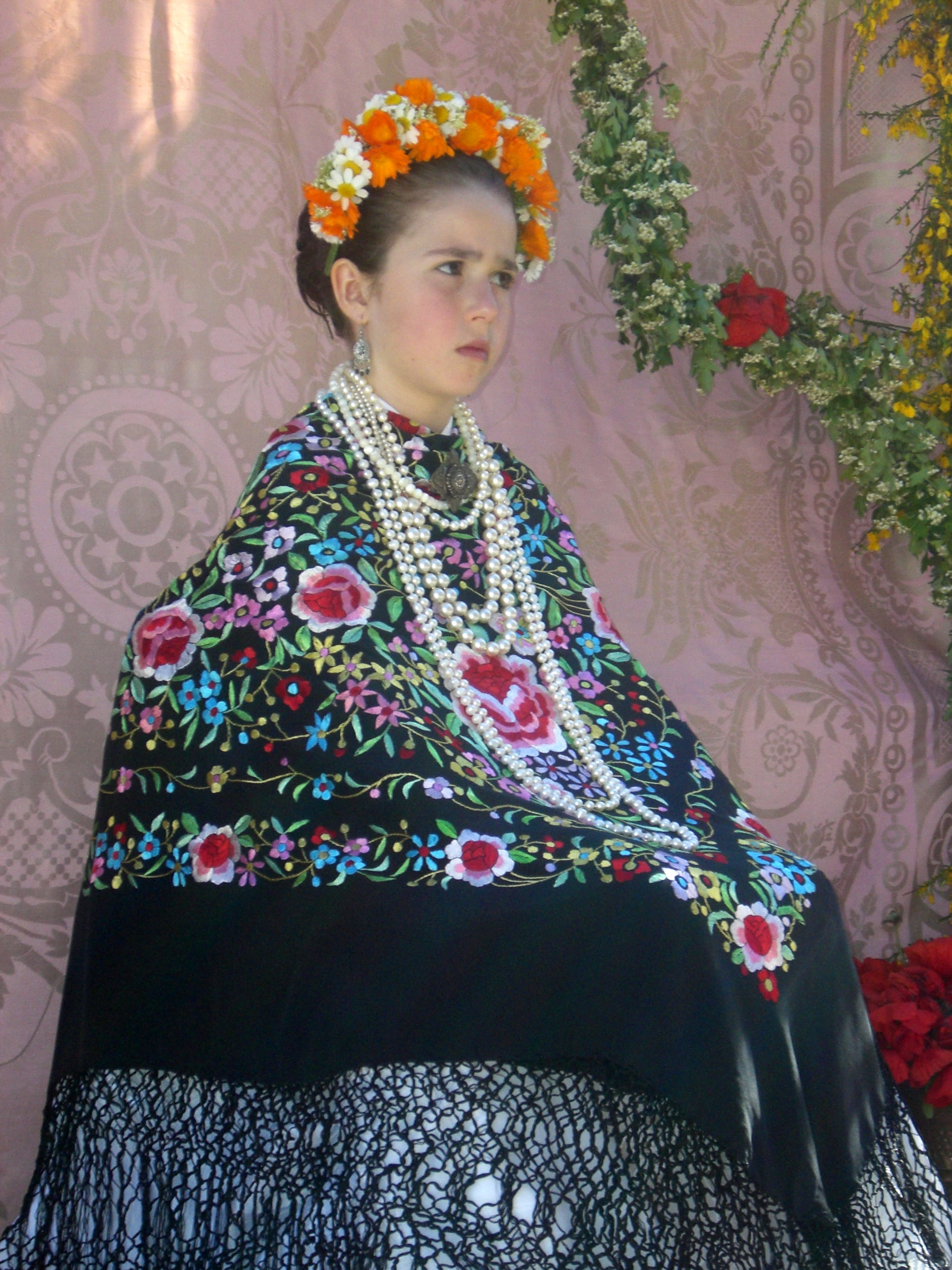 Detalle maya